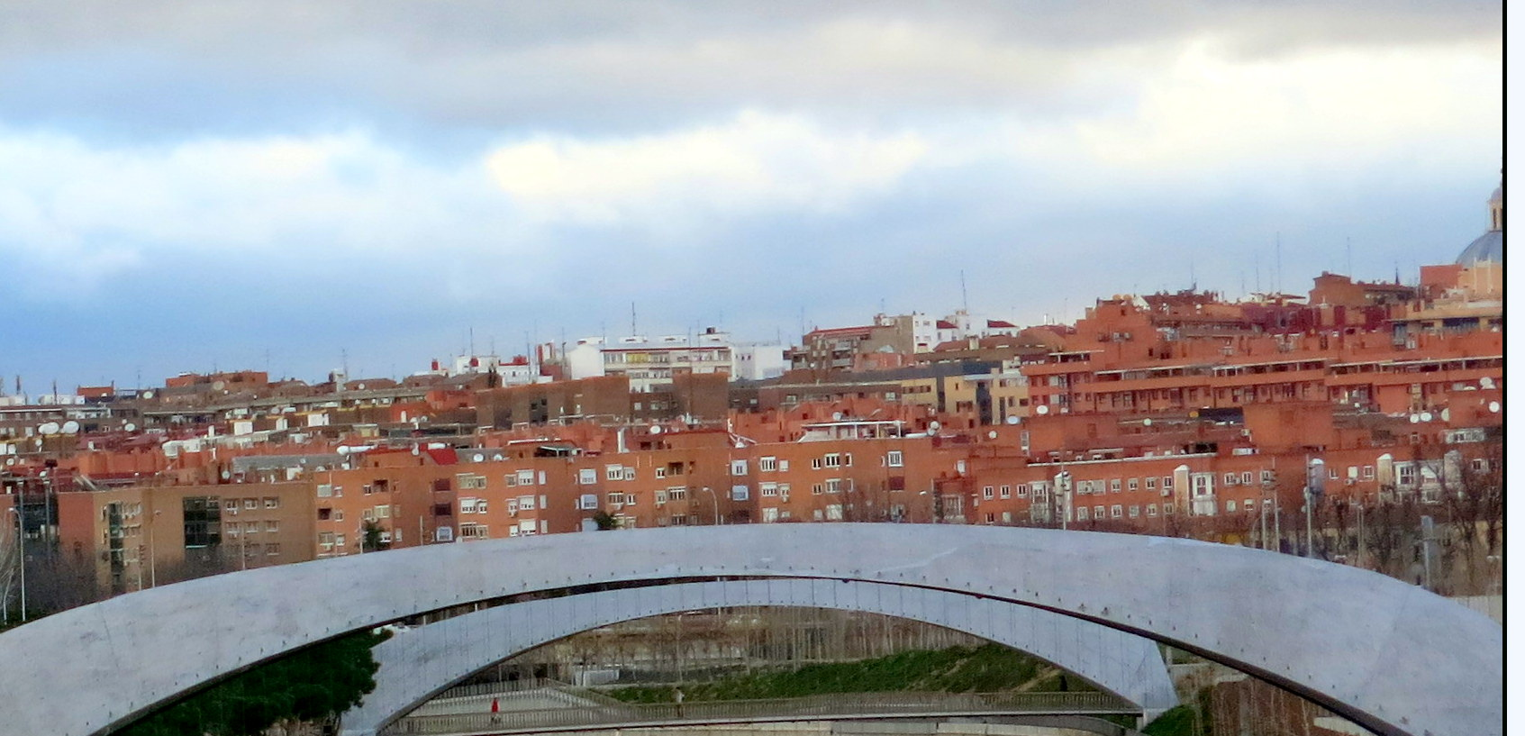 Vista del Manzanares río arriba desde el puente de la Princesa, en Madrid.